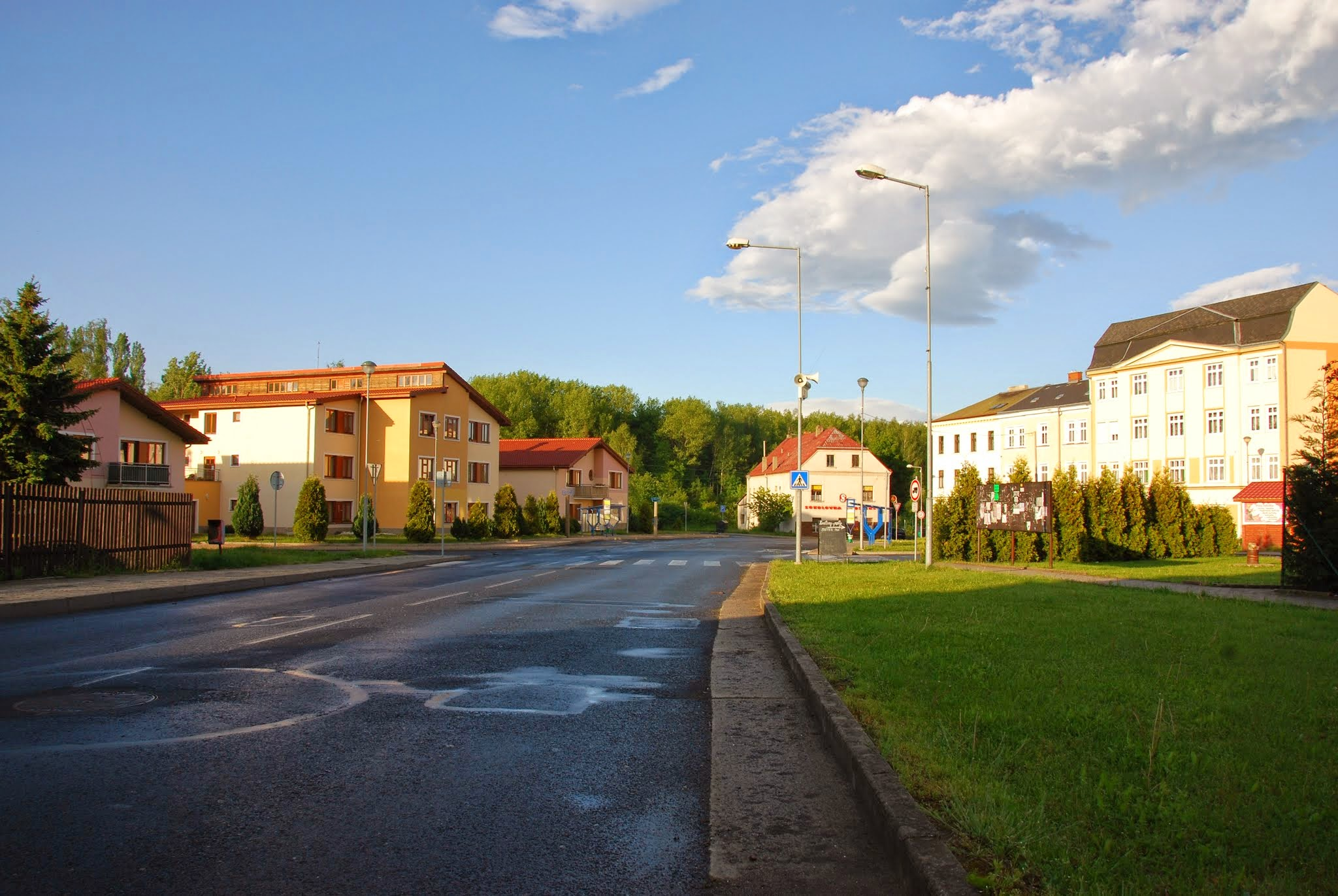 Pohled na Mírové náměstí od západu